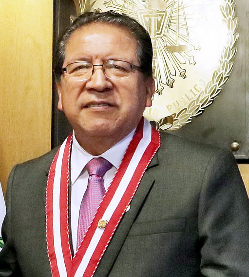 Fiscal de la Nación y jefe del (SAAL ) suscribieron un acuerdo de entendimiento para reforzar la (Ofaec).